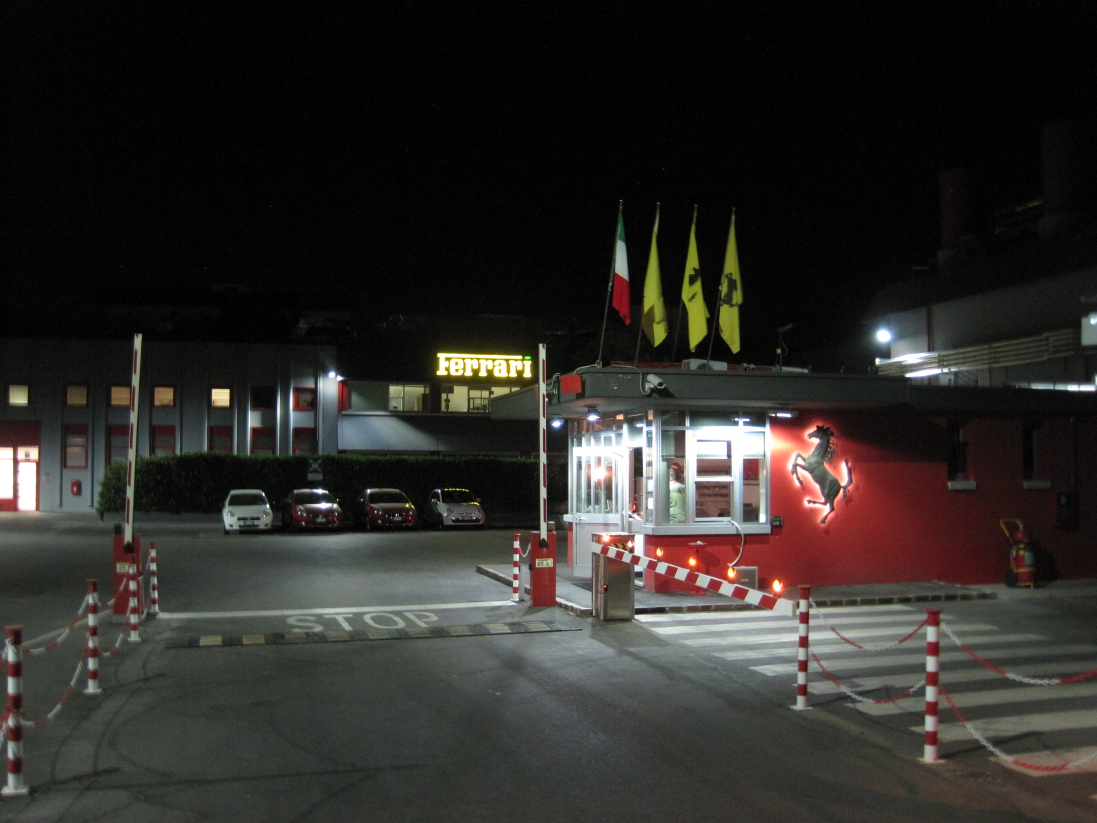 Ferrari Maranello